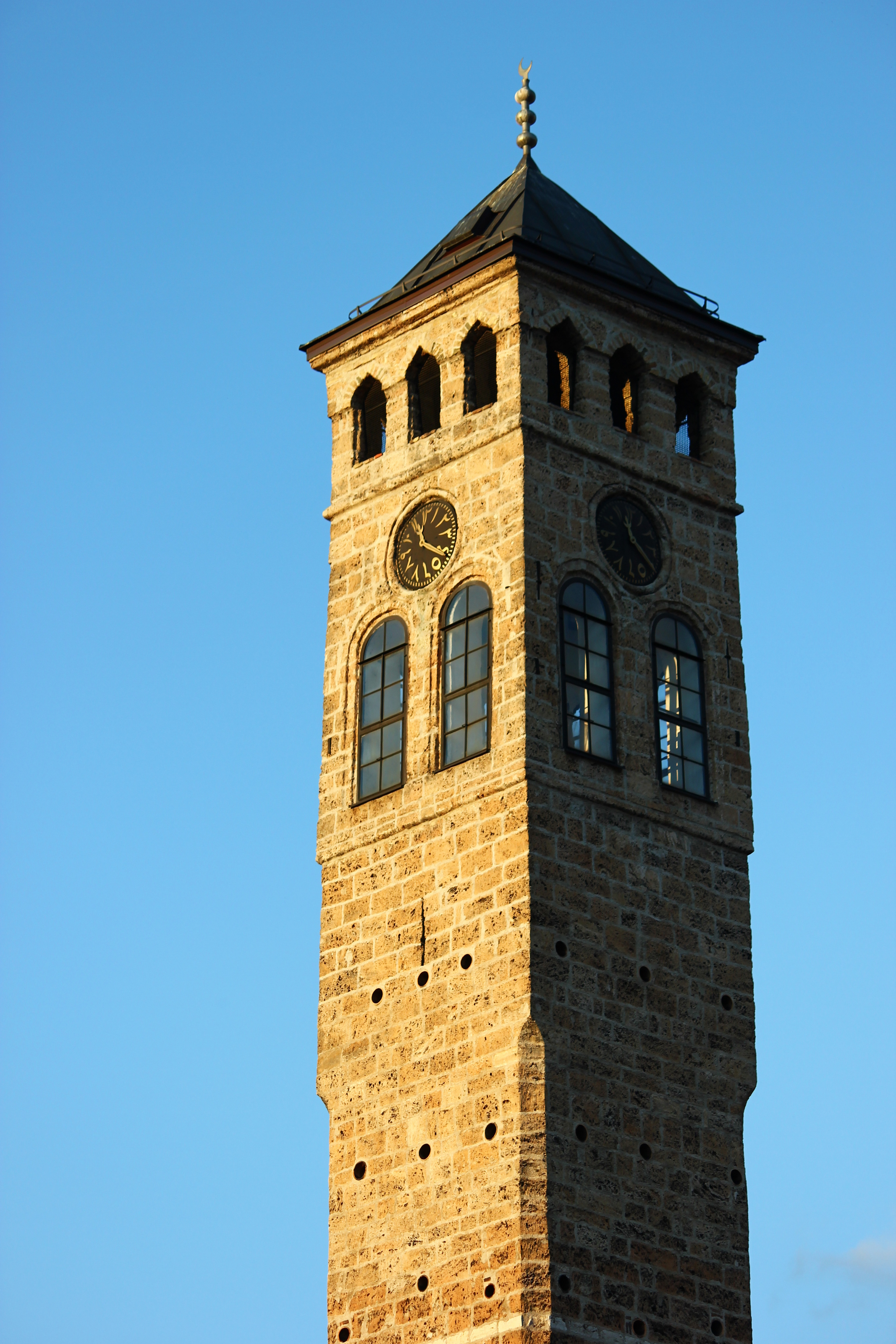 Die Sahat-Kula (Uhrturm) in der historischen Altstadt von Sarajevo.